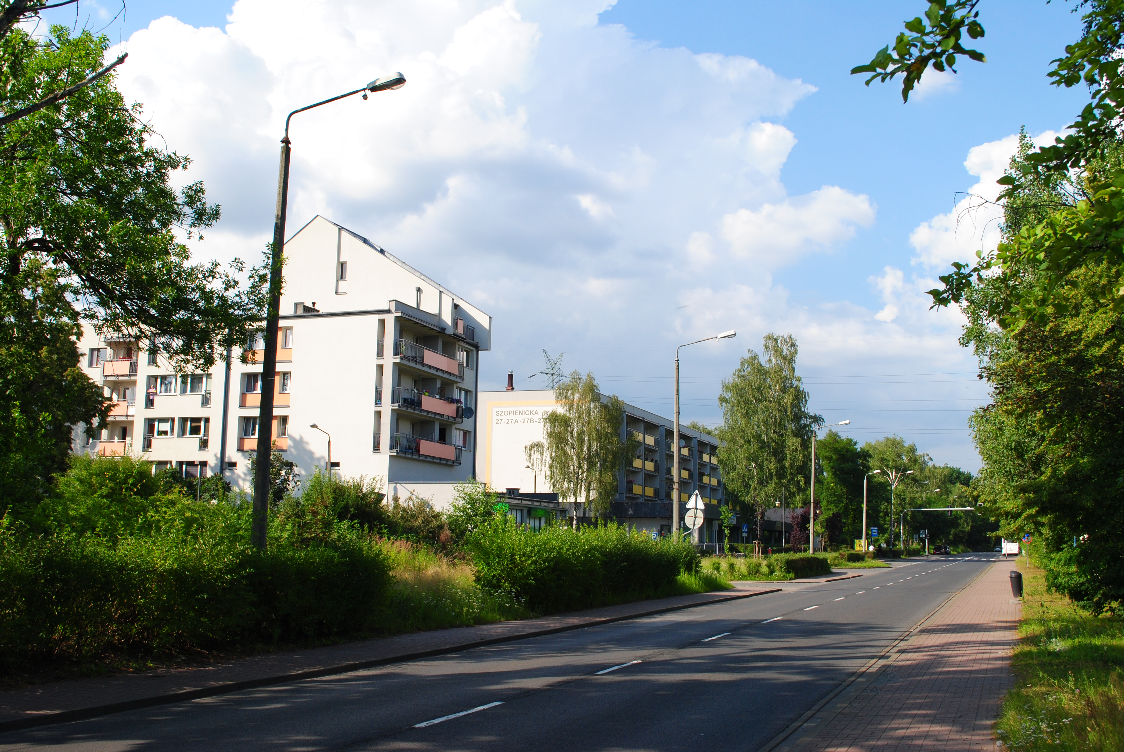 Katowice - Janów-Nikiszowiec. Bloki przy ul. Szopienickiej